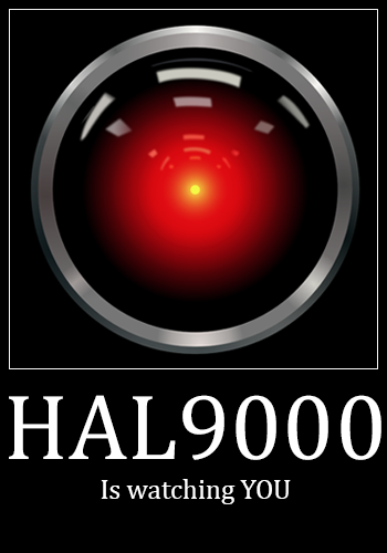 Image représentant le lien entre 1984 et 2001 : L'Odyssée de l'espace. L'Oeil de HAL9000 est de "Cryteria", disponible sous licence "Creative Commons Attribution 3.0 Unported" (Remix autorisé si l'auteur est cité. )